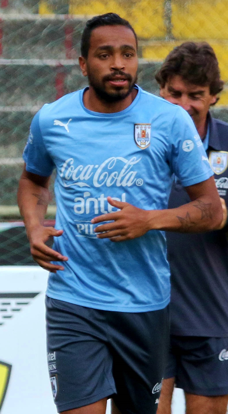 Guayaquil, 9 de noviembre de 2015 - El primer grupo de jugadores de la selección de Uruguay, llegó a Ecuador y realizó una práctica en el estadio Monumental. En la foto se observa al jugador uruguayo Álvaro Pereira. El partido entre las selecciones de Ecuador y Uruguay tuvo lugar el 13 de noviembre de 2015, con el resultado 2-1 a favor de los locales.